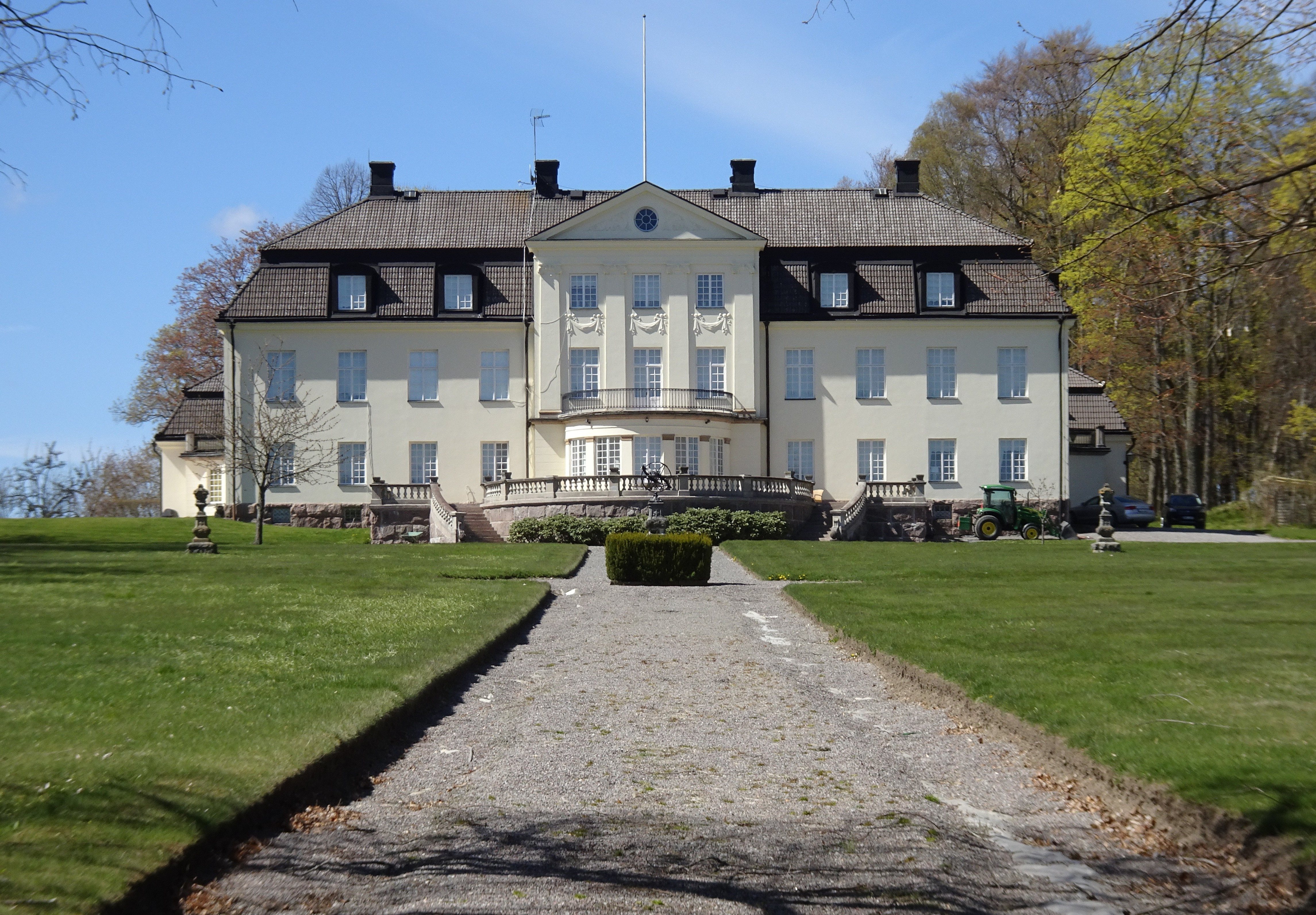 Godset Brandalsund fasad mot öster